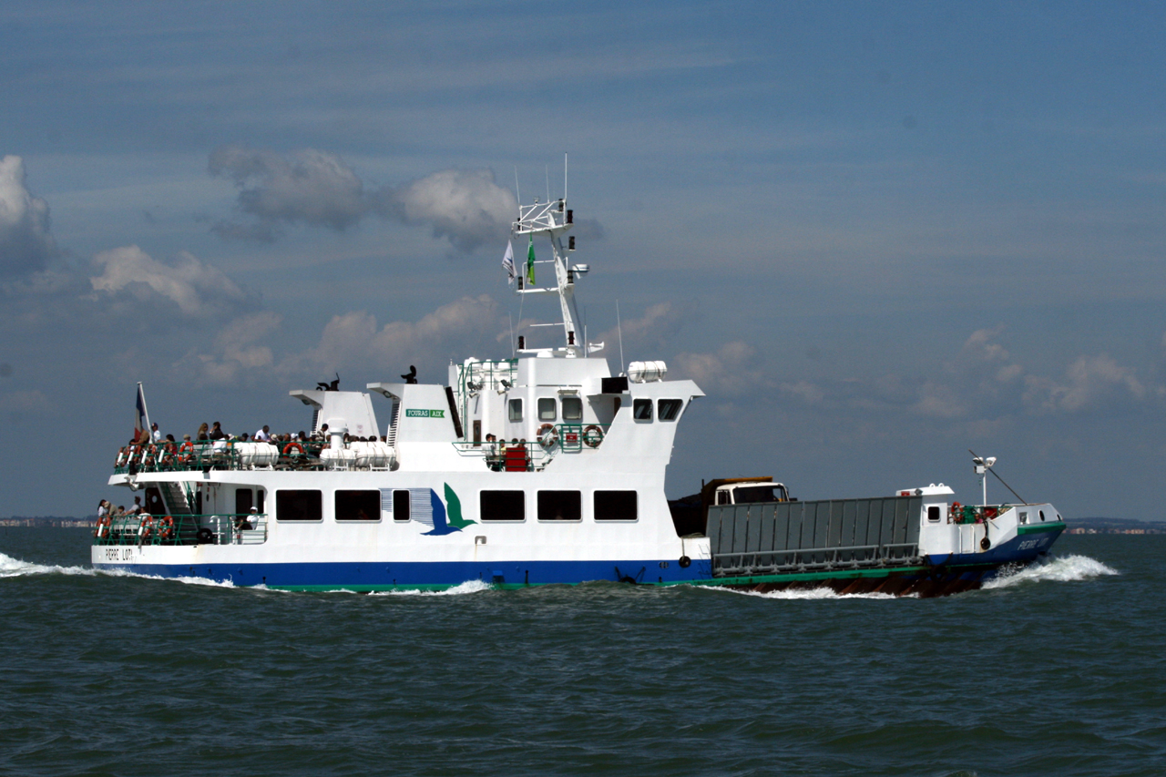 Ferry Pierre Loti faisant la traversée de l'île d'Aix à Fourras IMO number: 9032575 Callsign: FV8589